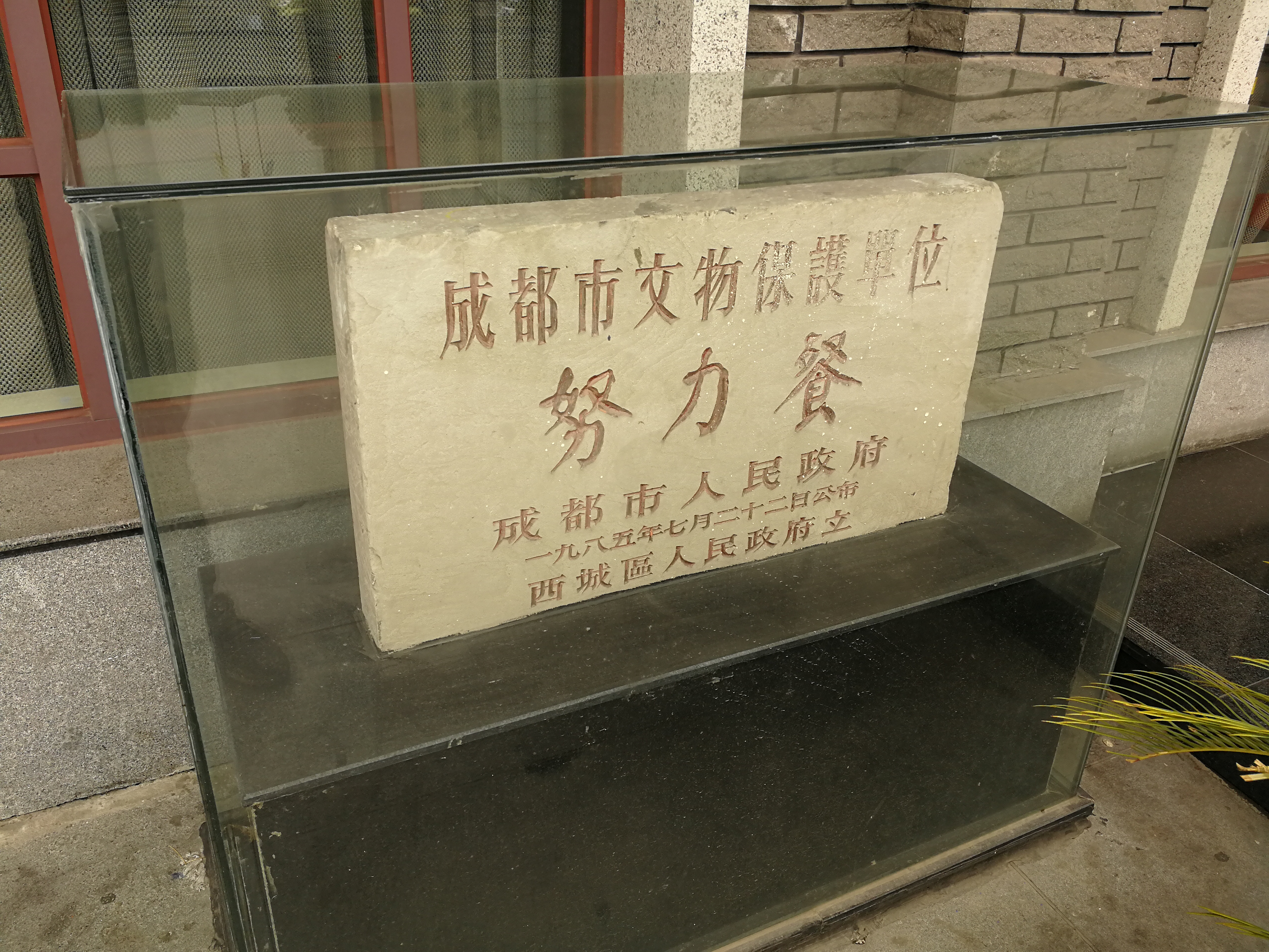 成都市一家餐厅——努力餐的文保碑